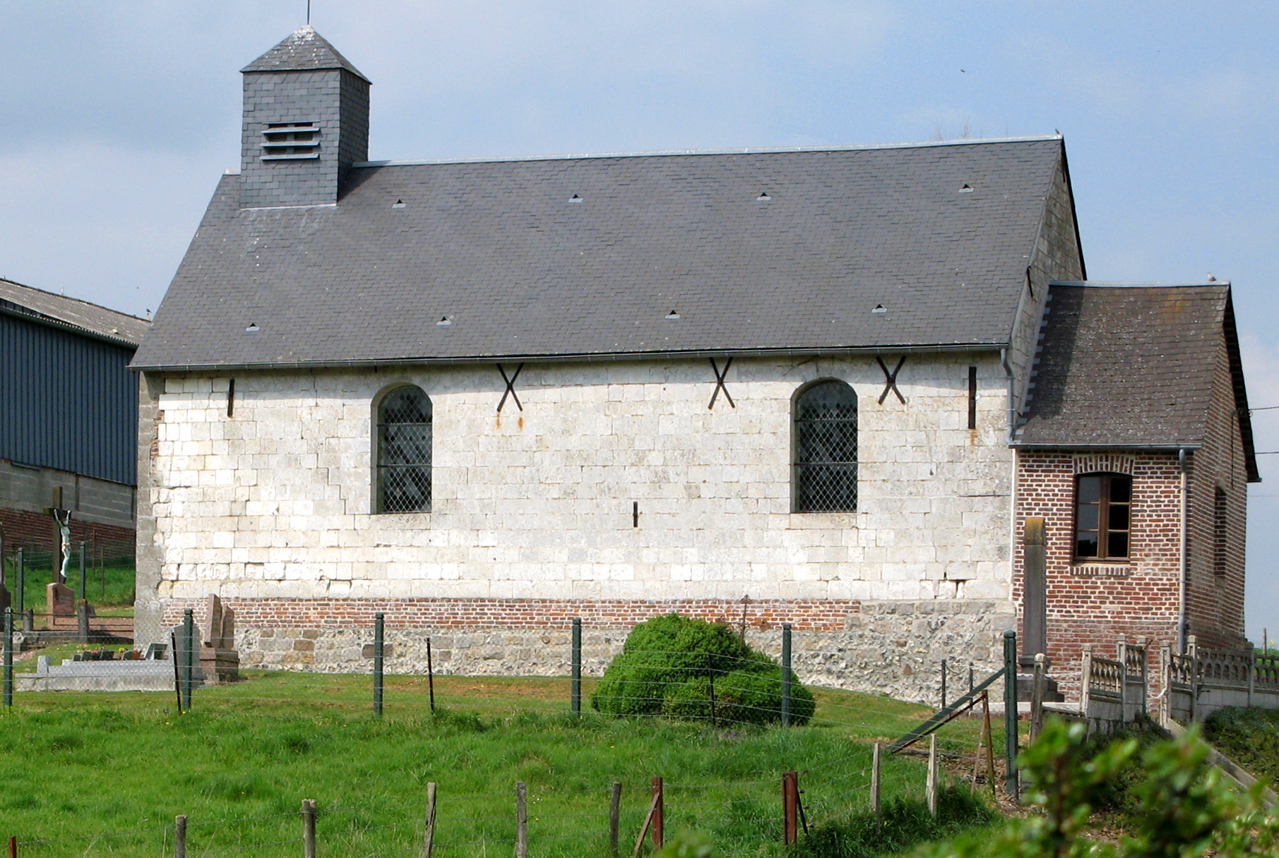 La Vicogne (Somme, France) - L'église. .